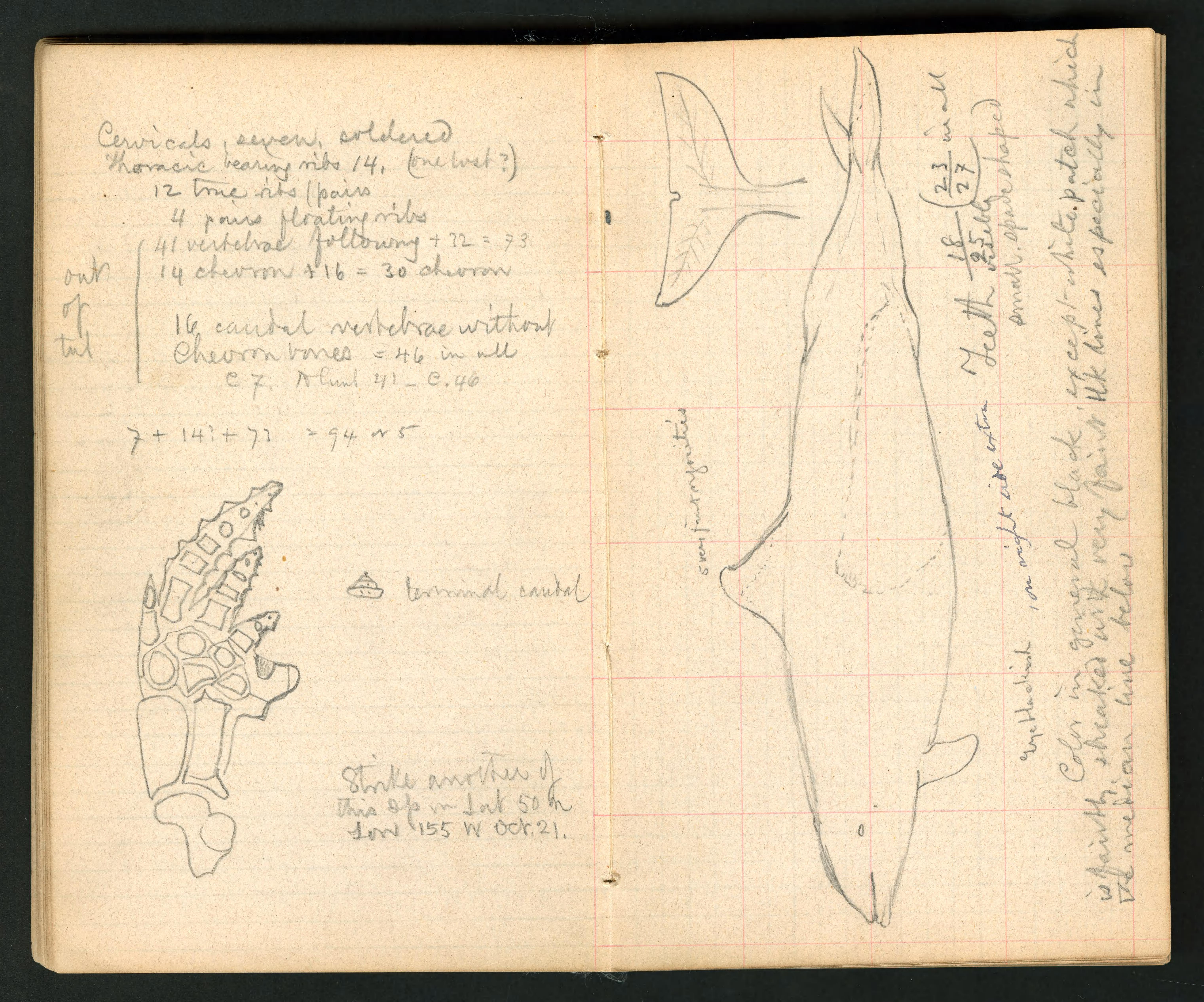 Field Notes, 1873